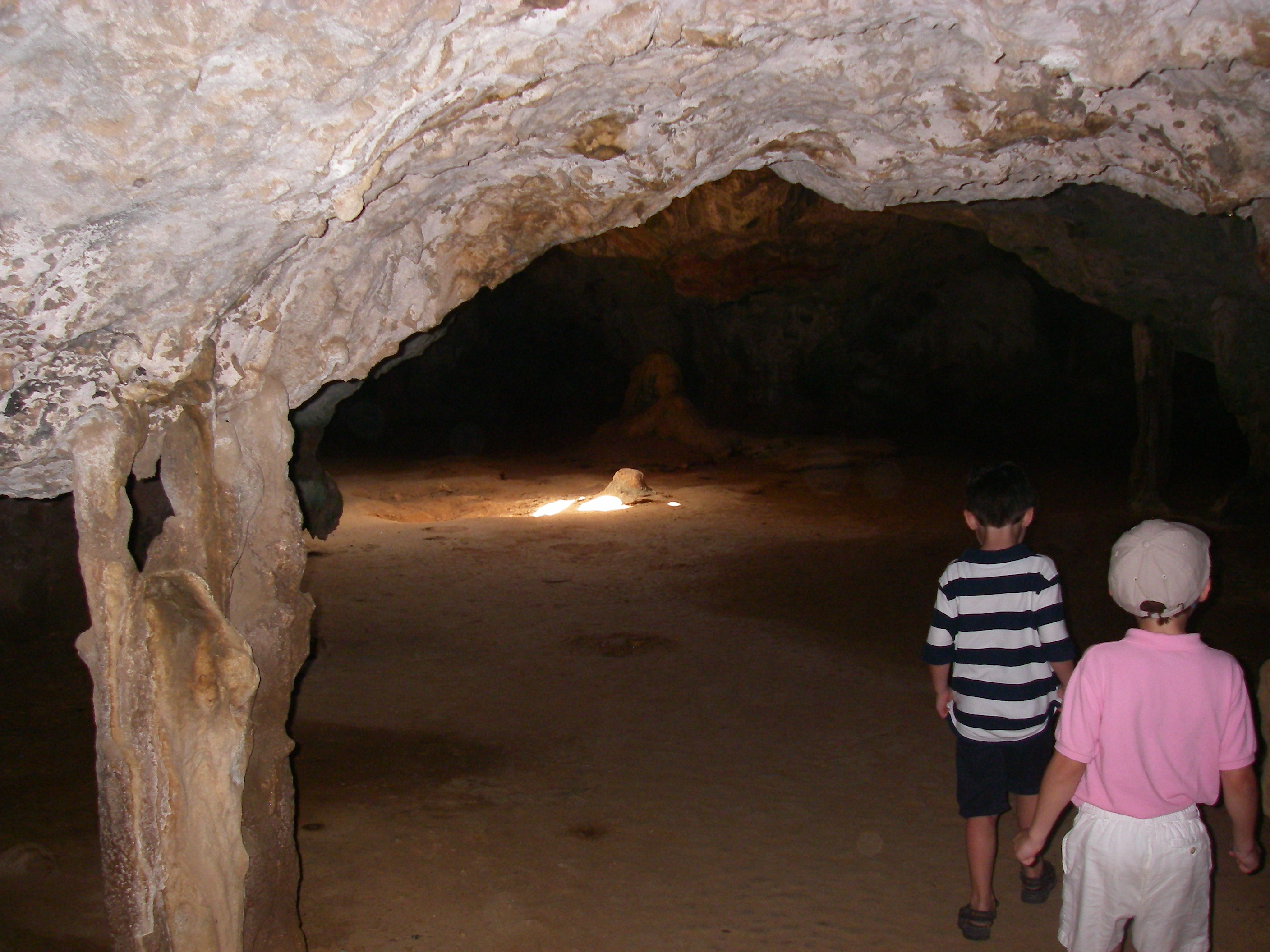 Guadirikiri Cave in Aruba